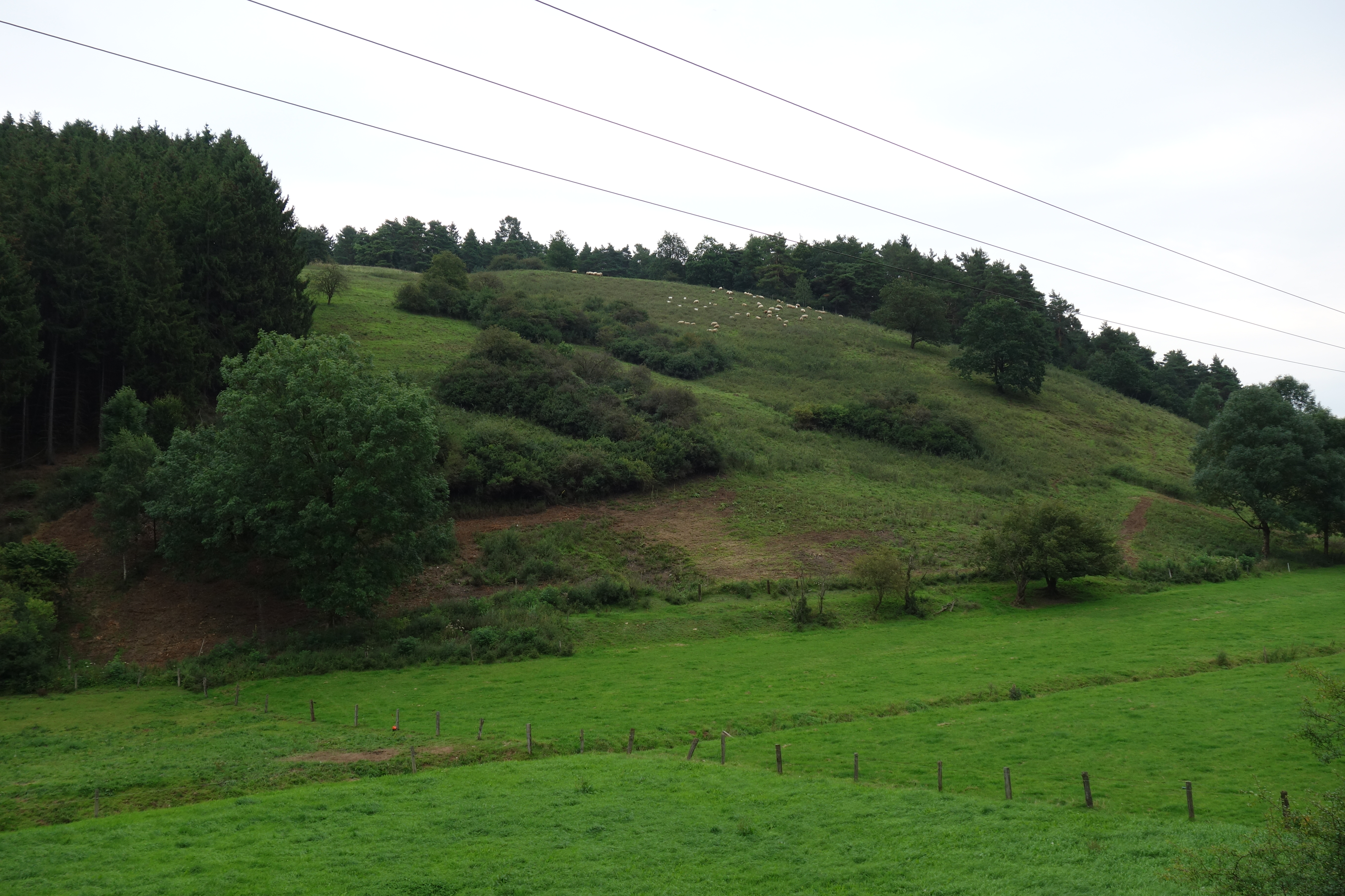 Naturschutzgebiet Wulsenberg; mittlerer Bereich mit Schafen.